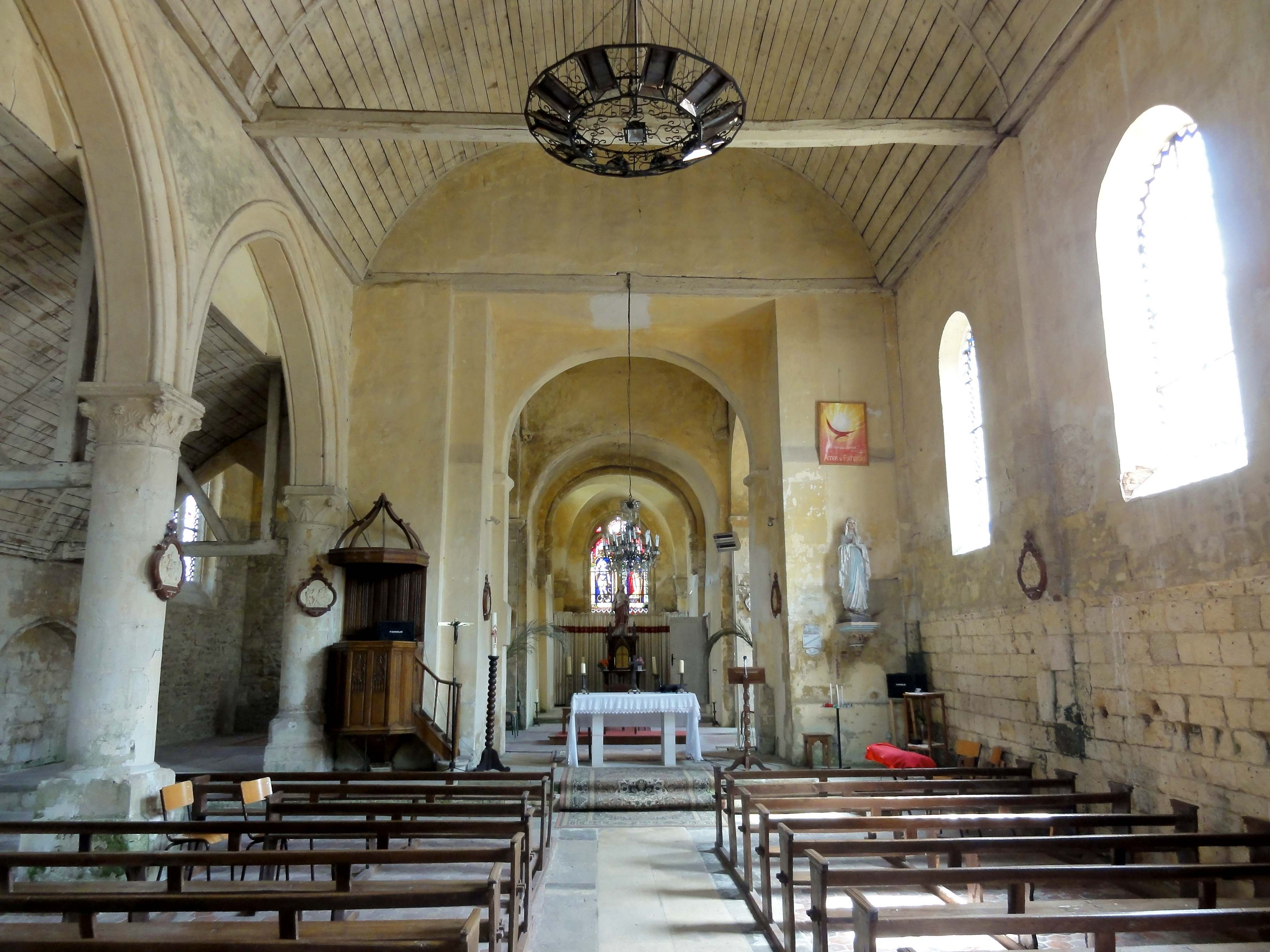 Intérieur de l'église (voir titre).